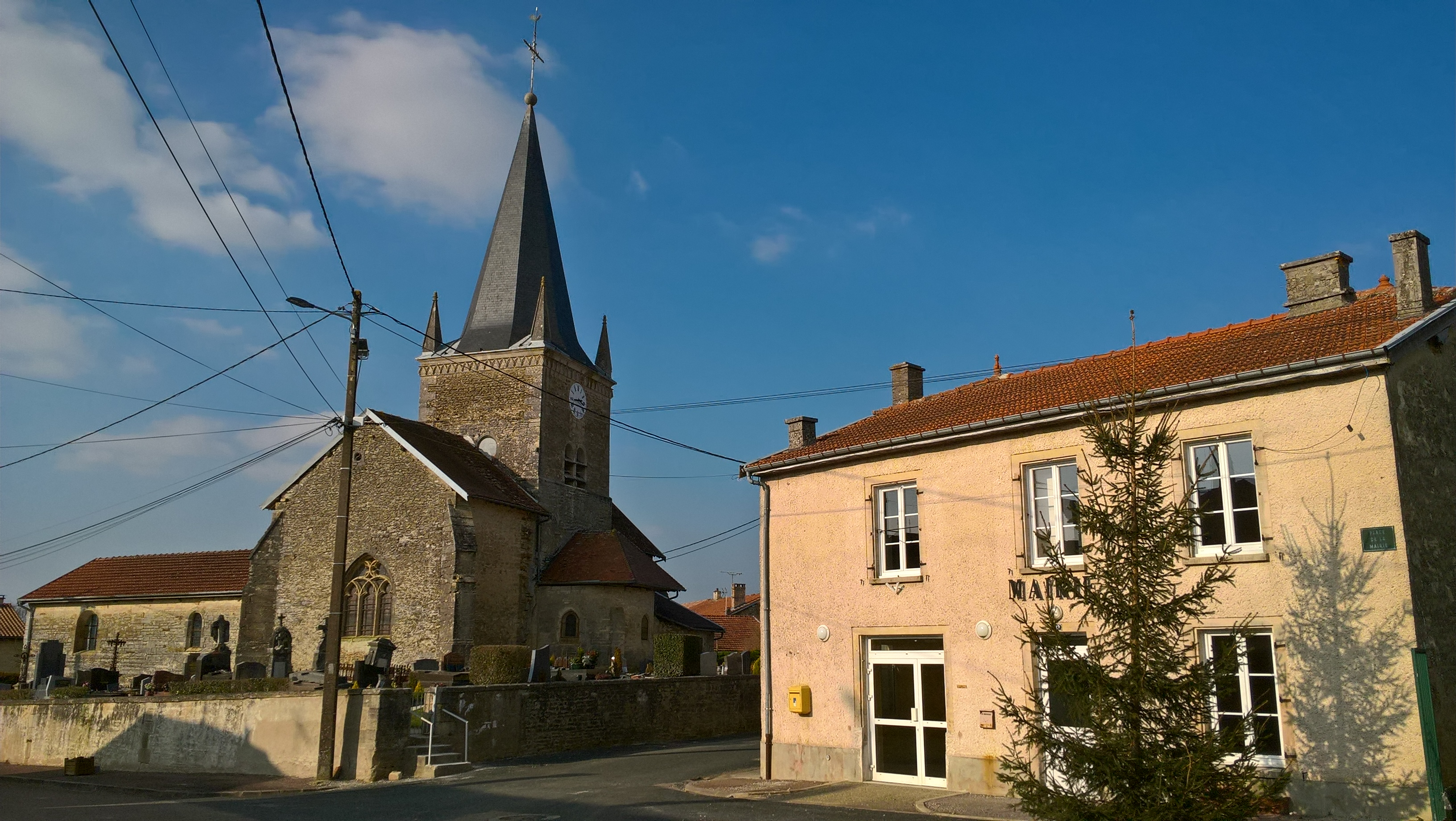 Blumeray, la mairie et l'église.